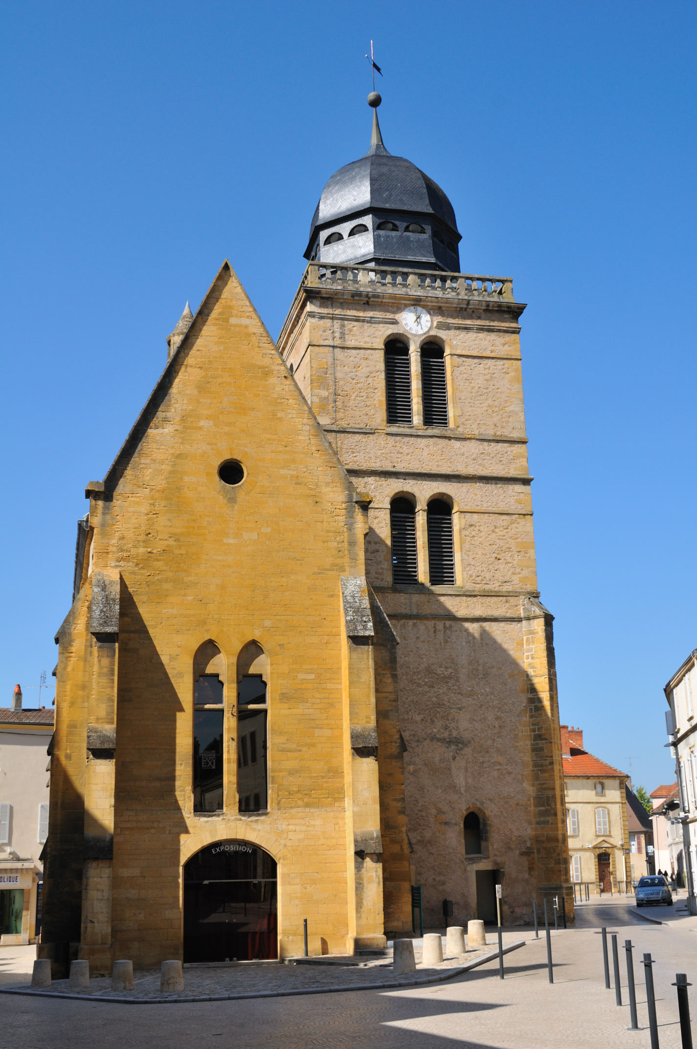 Tour Saint-Nicolas (ancienne église Saint-Nicolas, consacrée en 1535, transformée en hôtel de ville à la Révolution, jusqu'en 1858), Paray-le-Monial, Saône-et-Loire, France